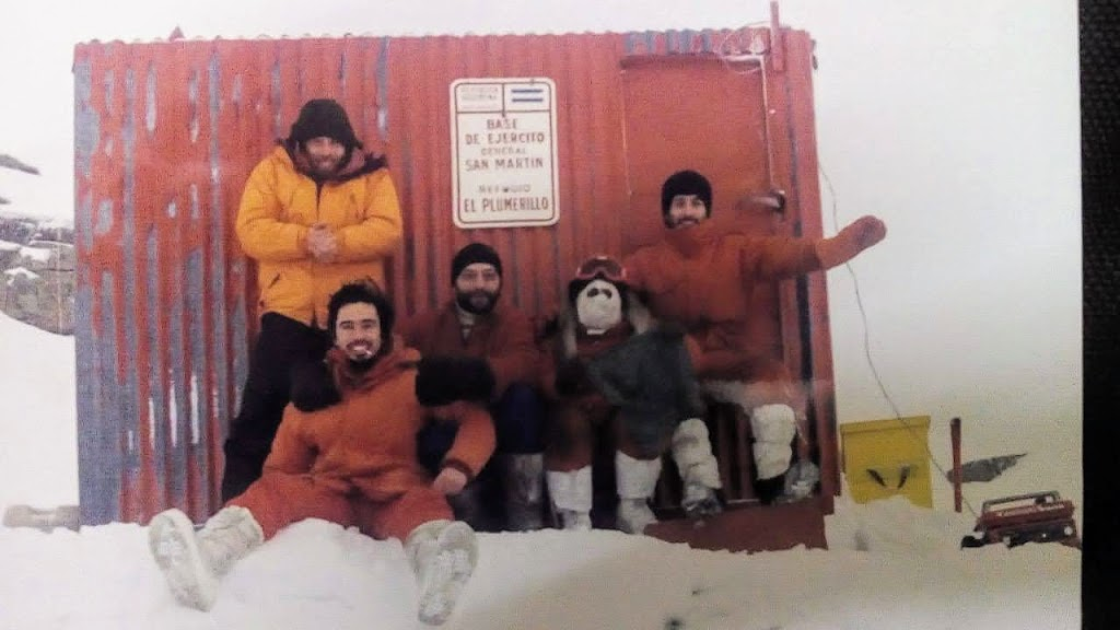 Esta foto fue tomada en el Refugio "El Plumerillo" por el Capitan del Ejército Argentino Guillermo Andres DOLDER (Jefe de la Base Antártica San Martin)durante el año 1997